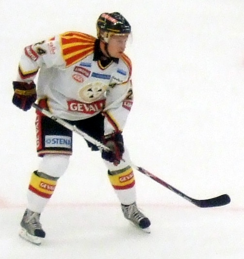 Ice hockey player Mads Hansen of Brynäs IF in Gärdehov, Sundsvall, Sweden